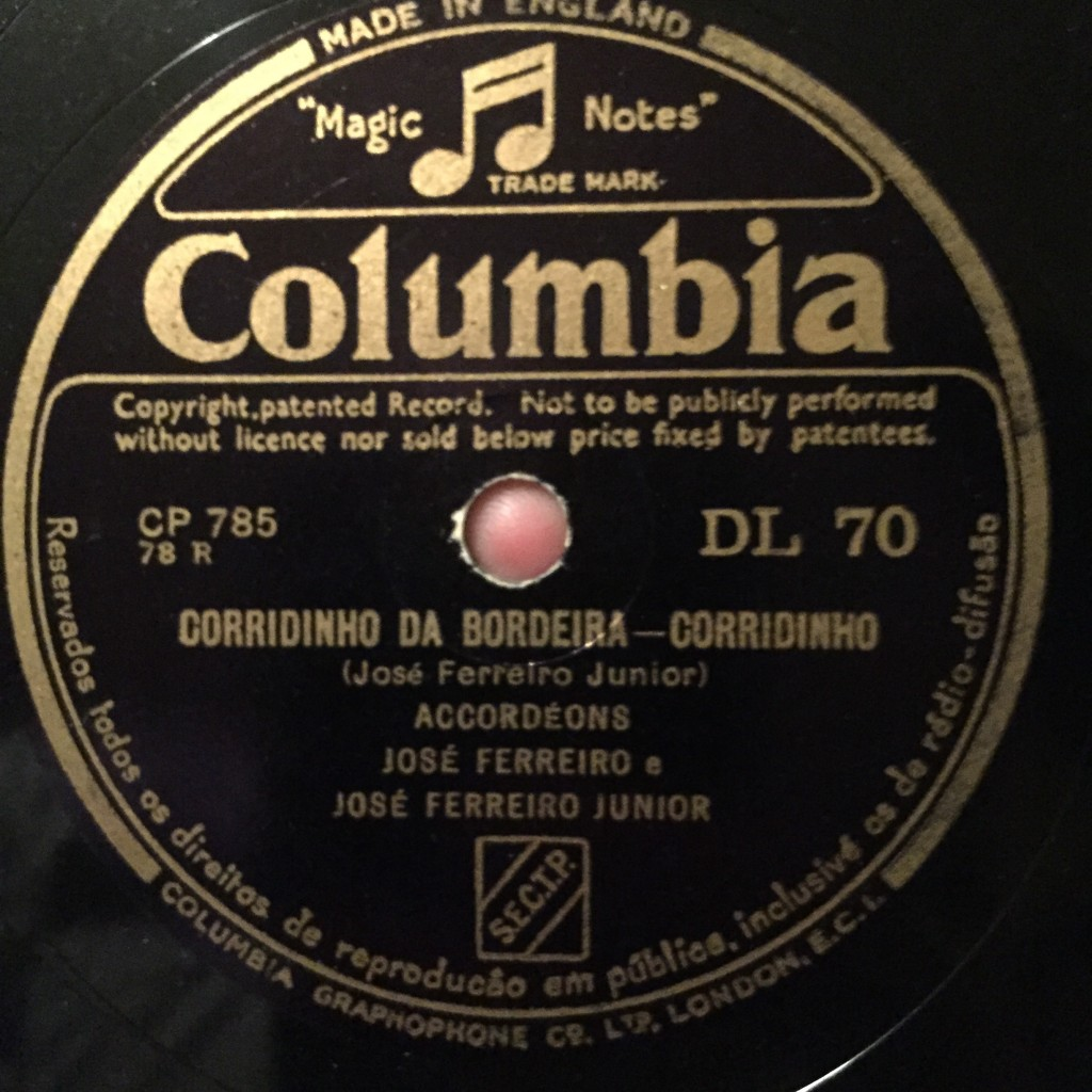 Disco de 78 rotações, do corridinho de Bordeira,gravado na década 40